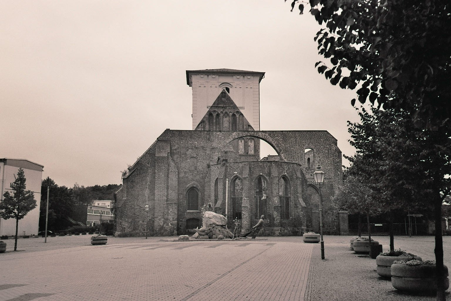 Kirchenruine in Wriezen, Deutschland